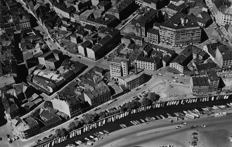 Vaterland i Oslo 1952. Elvegata og Rødfyllgata fra nedre venstre hjørne opp mot høyre. Grønlands torg nede til høyre.